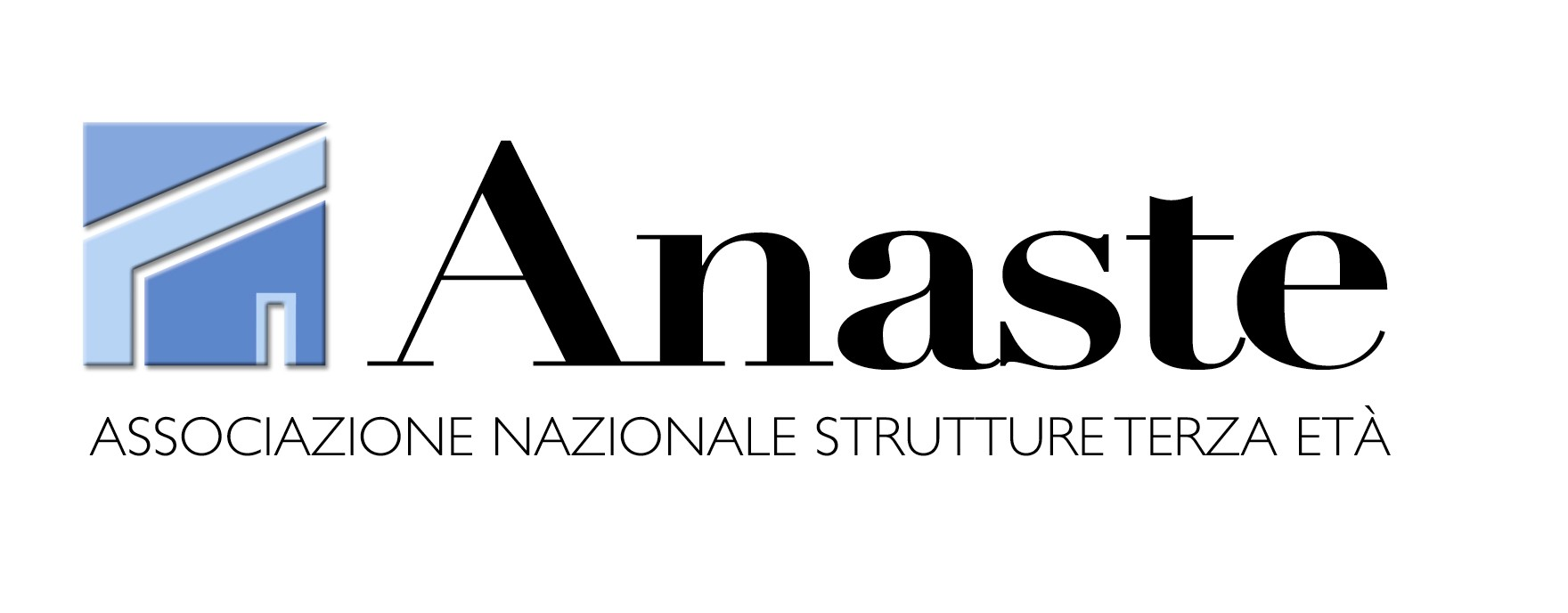 Logo ufficiale ad alta definizione di ANASTE - Associazione Nazionale Strutture Terza Età